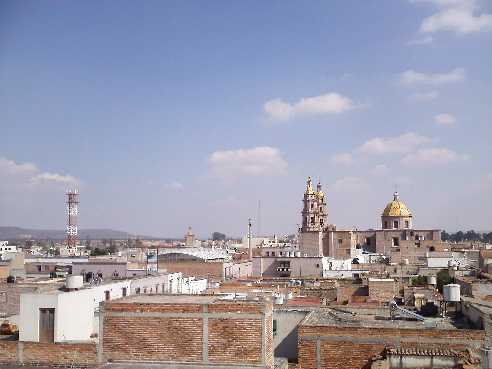 SMA